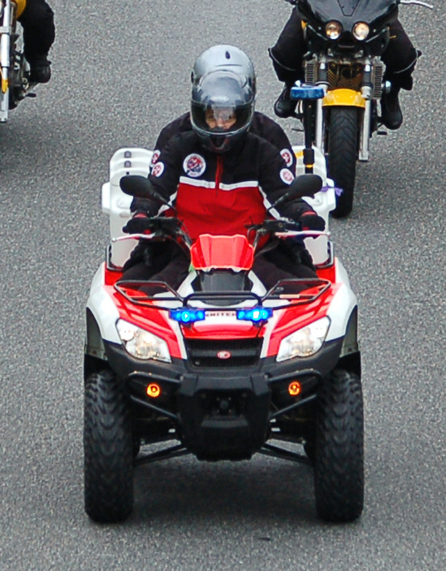 Quad der Johanniter auf dem Weg vom MOGO Hamburg über die A7 zur großen Abschlussparty nach Kaltenkirchen, Schleswig-Holstein